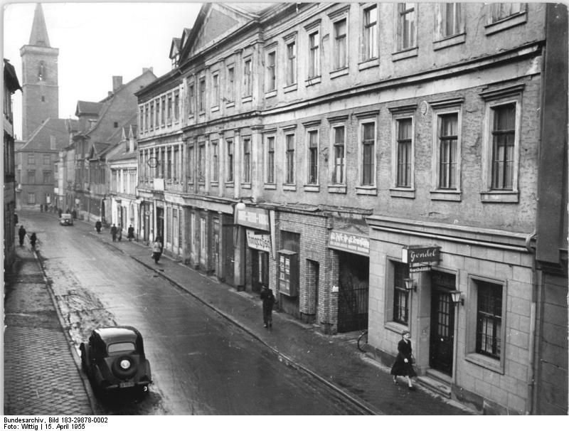 Erfurt, Kongresssäle Zentralbild TBD-Wittig 15.4.1955 -2905- 3 Motive Kongreßsäle in Erfurt (Photo Wittig) Aussenansicht der Kongreßsäle in der Erfurter Futterstrasse im Zustand des Gebäudes im Februar 1955. Denkmalswertes Gebäude, laut Programmerklärung des Ministeriums für Kultur der DDR.